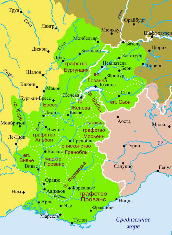 Королевство Арелат в 1034 г.